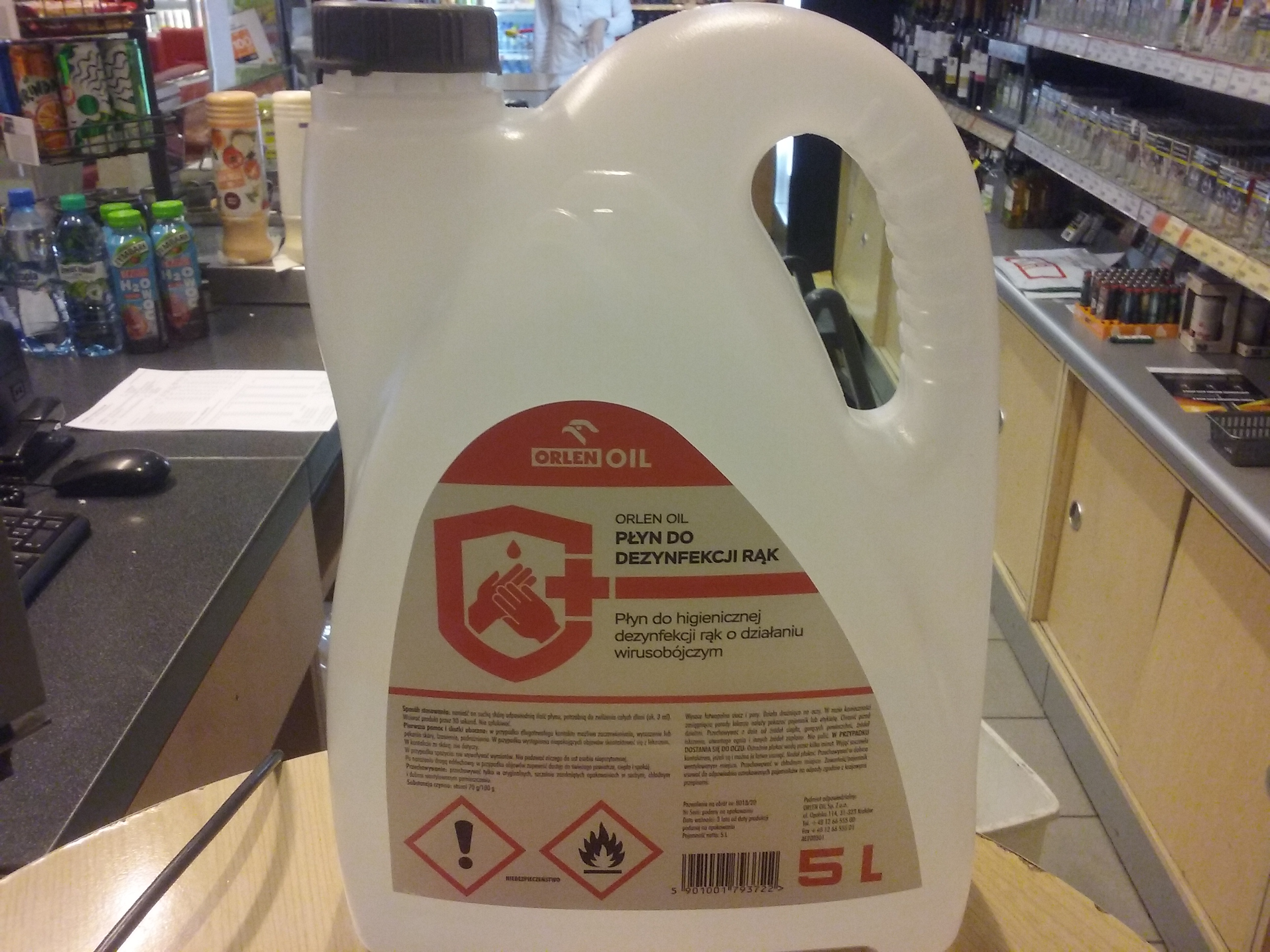 COVID-19. Orlen, Płyn do higieniczniej dezynfekcji rąk o dzałaniu wirusobójczym, 5L